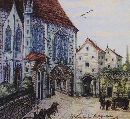 Nordseite der Steyrer Stadtpfarrkirche mit ehemaliger Stadtbefestigung